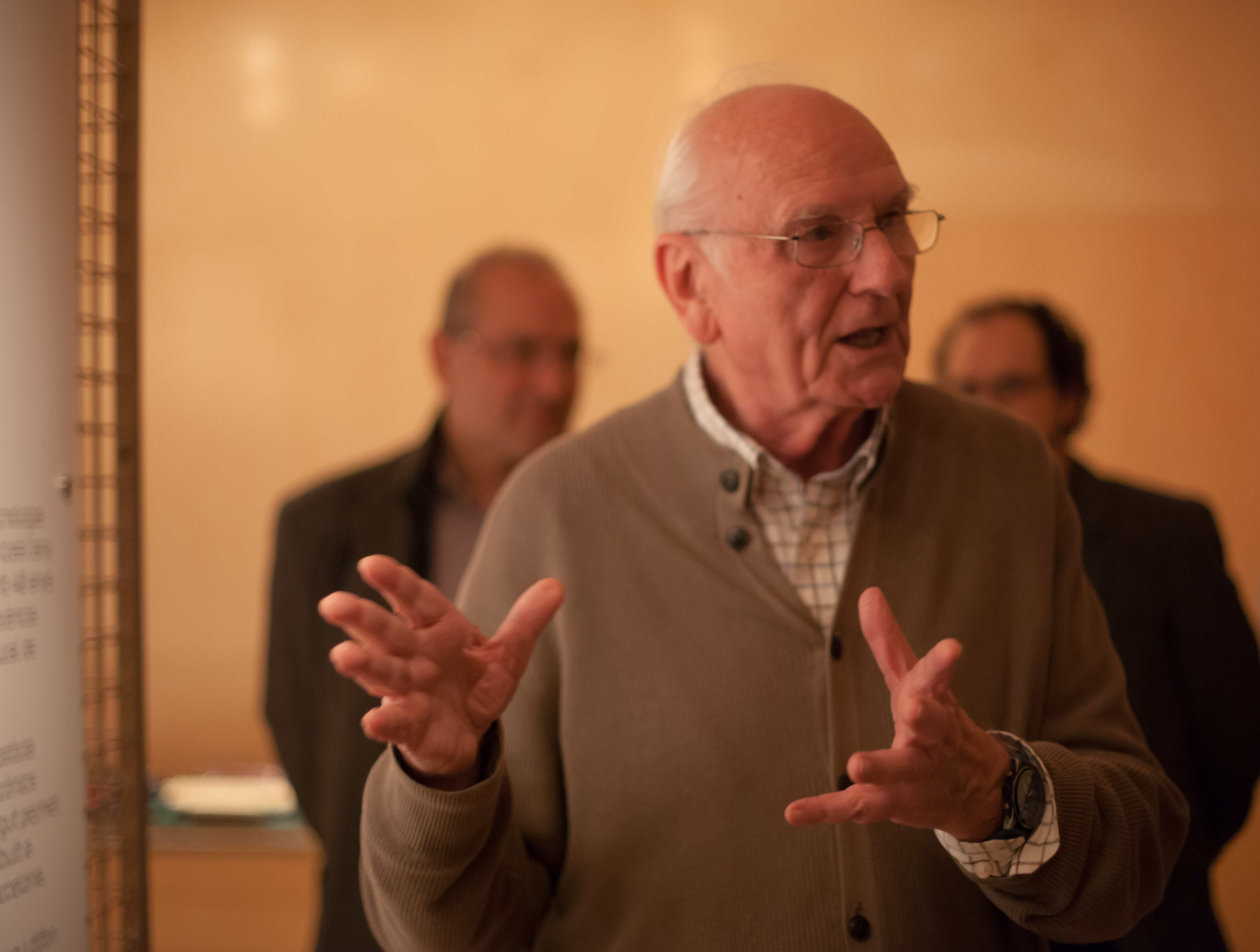 Retrat d'Andrés Lewin-Richter durant una explicació el dia de la inaguració de "Phonos, 40 anys de música electrònica a Barcelona".